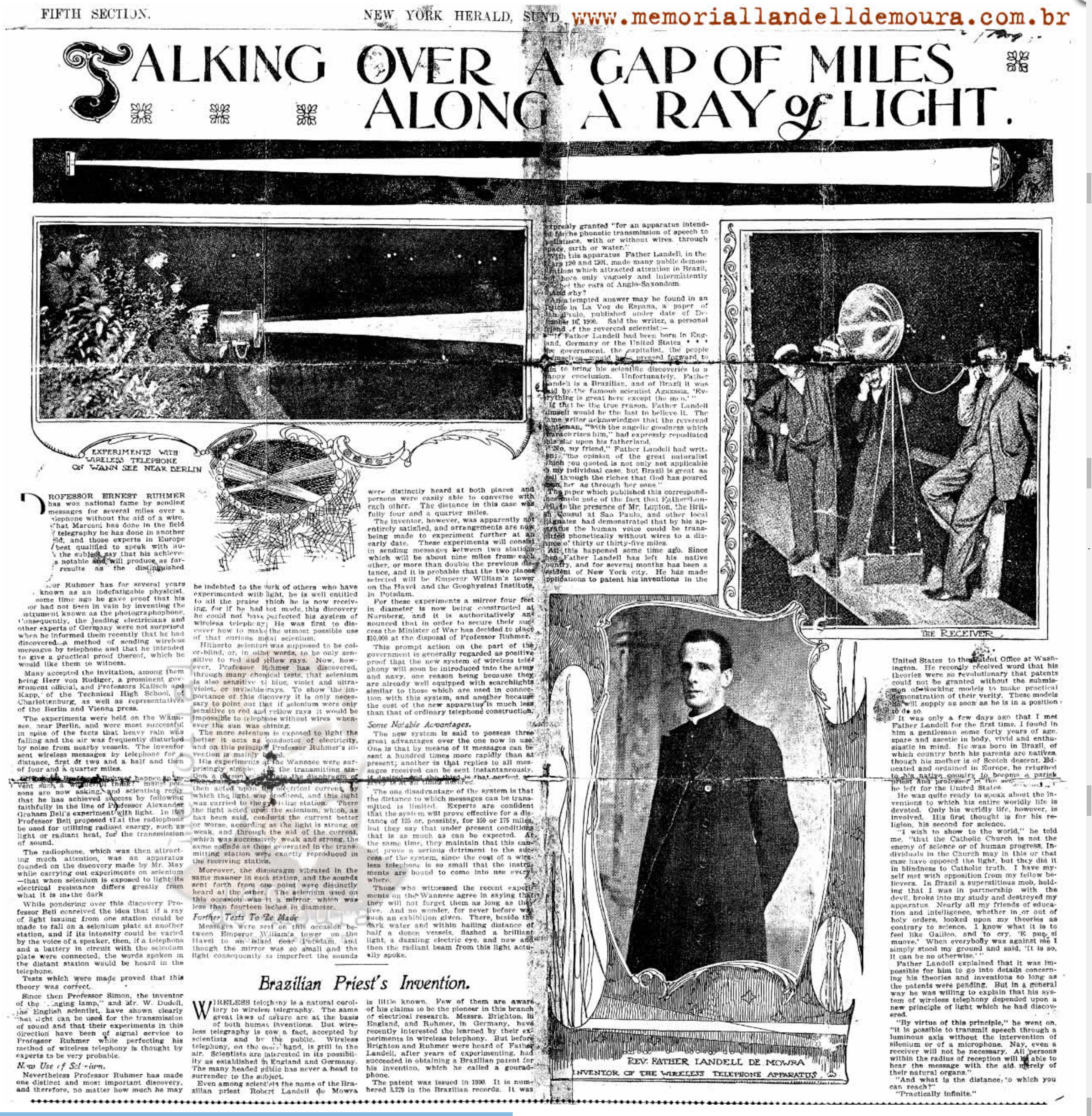 Fotografia do padre Landell de Moura no jornal New York Herald